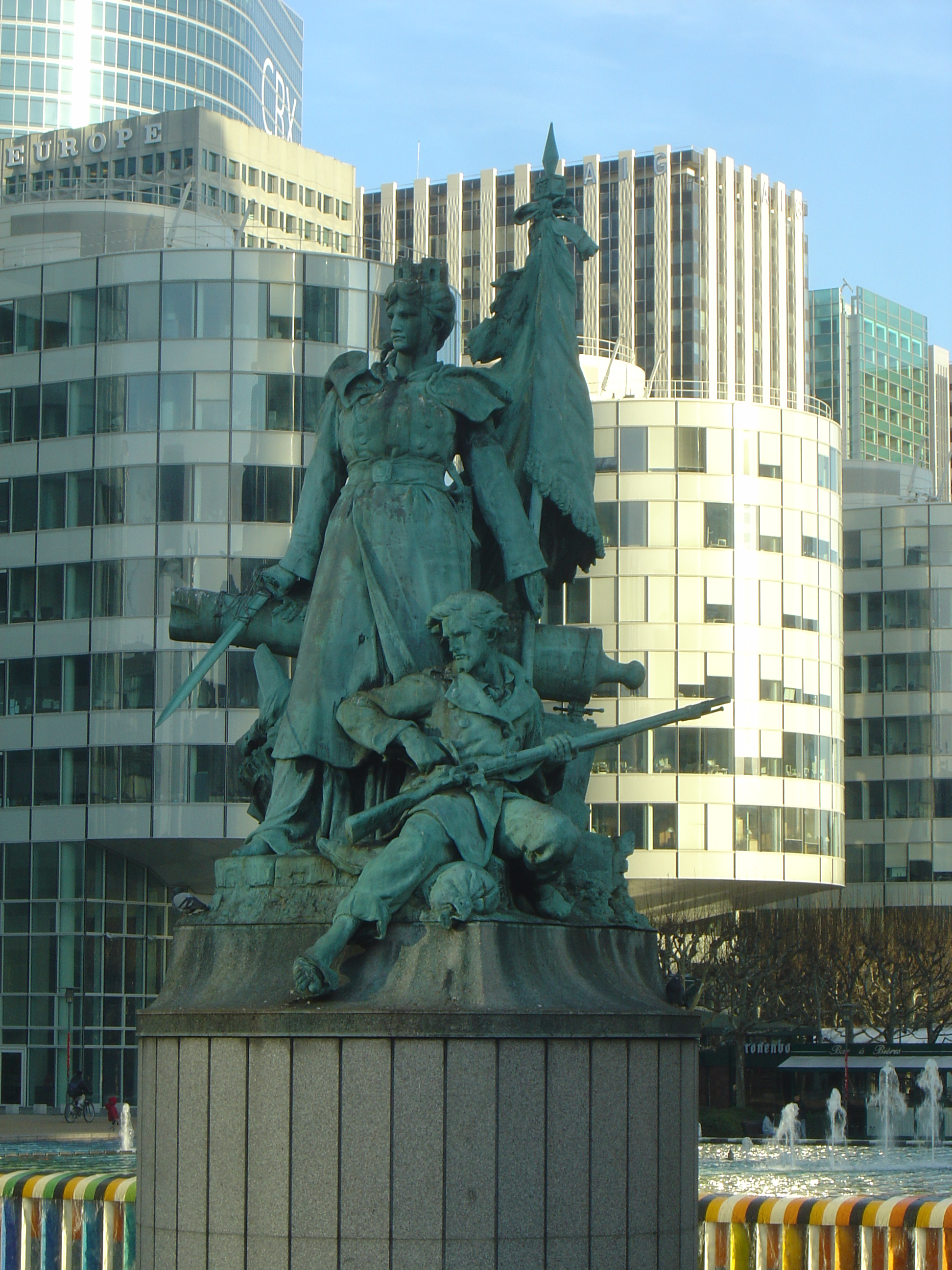 Paris, La Défense Louis-Ernest Barrias (1841-1905), La Défense de Paris